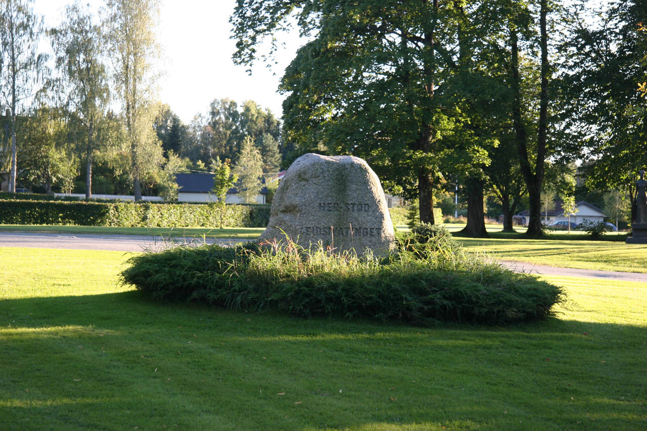 «Her stod Eidsivatinget», Markering på Eidsvoll